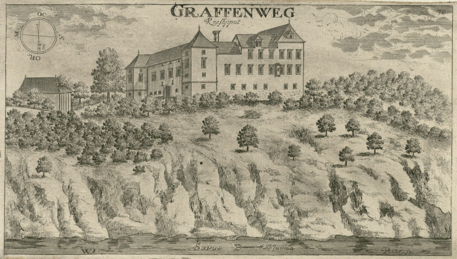 Grad Knežija (Graffenweg)